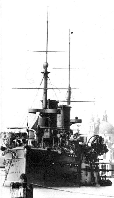 La RN Vettor Pisani ormeggiata in Laguna a Venezia